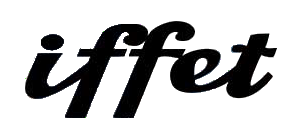 Logo de la serie de televisión Iffet